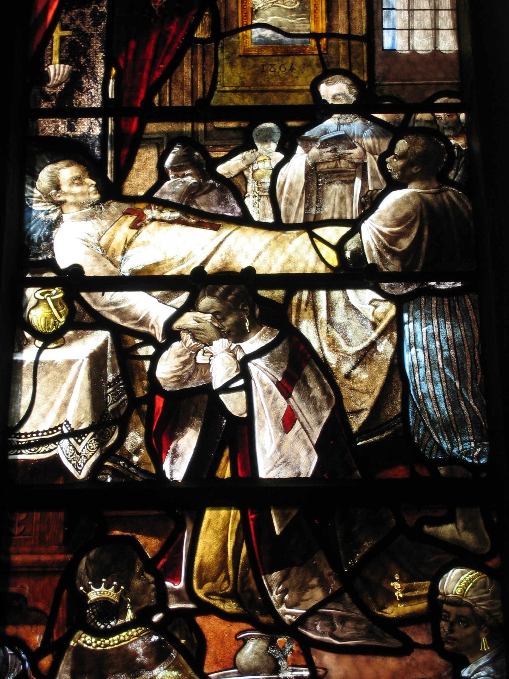 Mort du Père Laval Détail d'un vitrail de l'église de Pinterville.